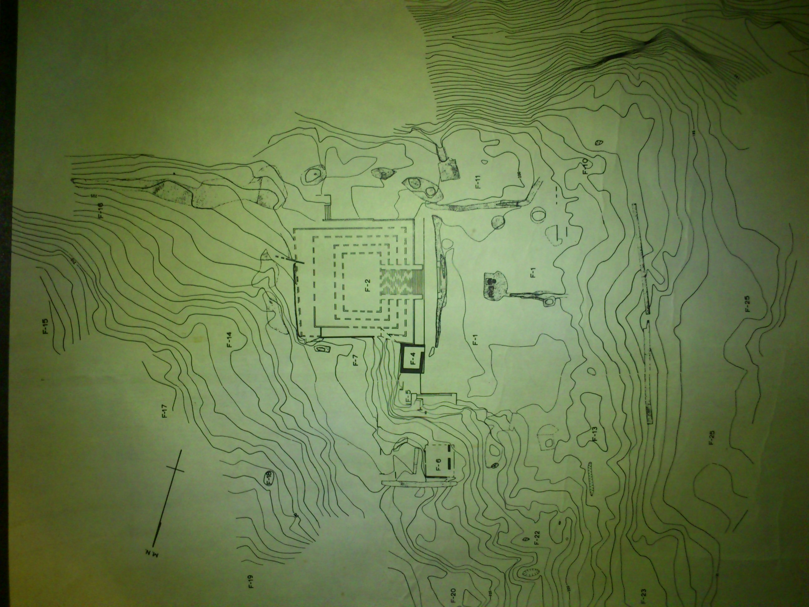 intervalo de contorno 50 centimetros